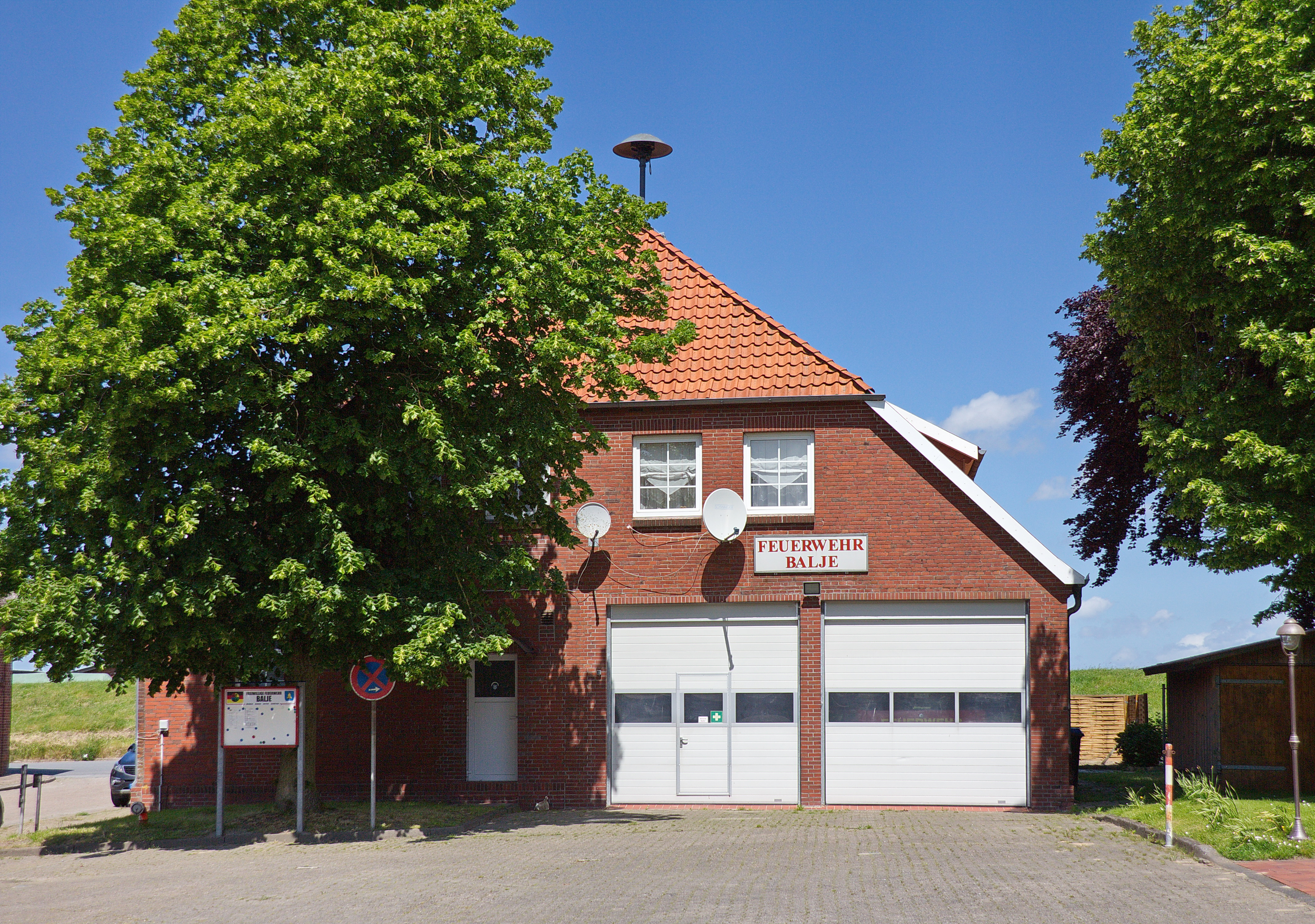 Balje zwischen Elbe und Oste in Niedersachsen, Deutschland.